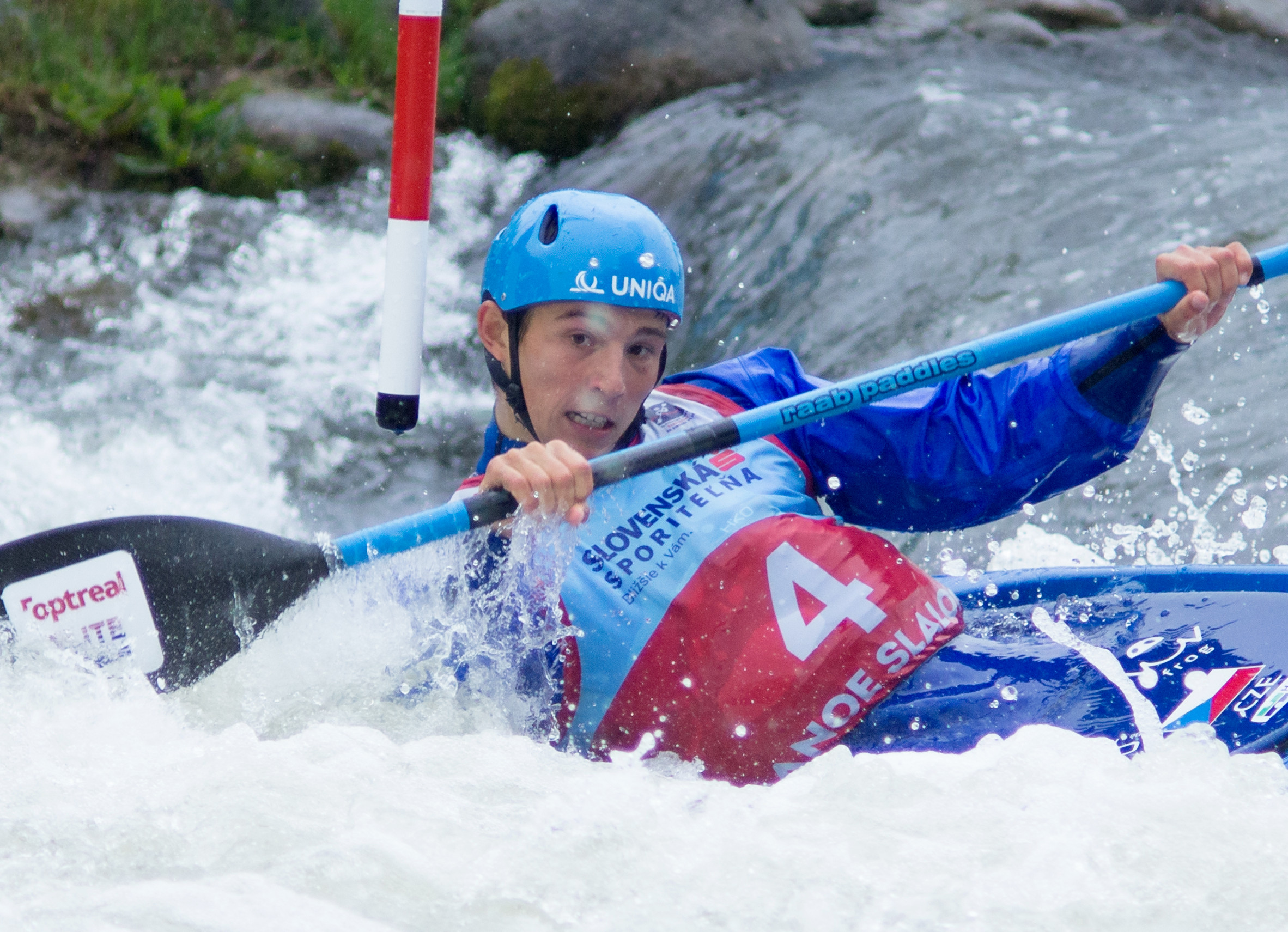 Jirka Prskavec